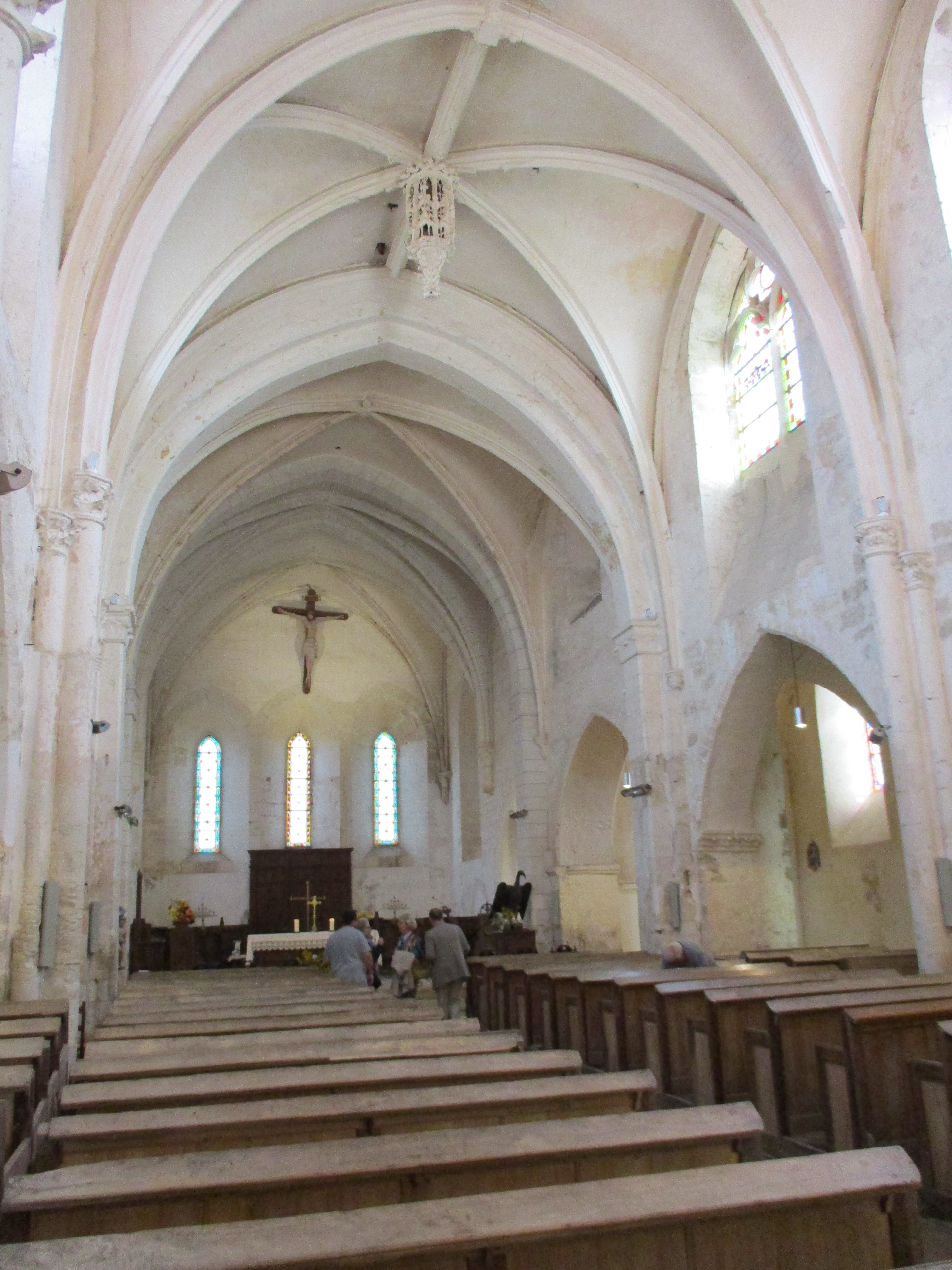 Nef de l'église de Dixmont (Yonne).